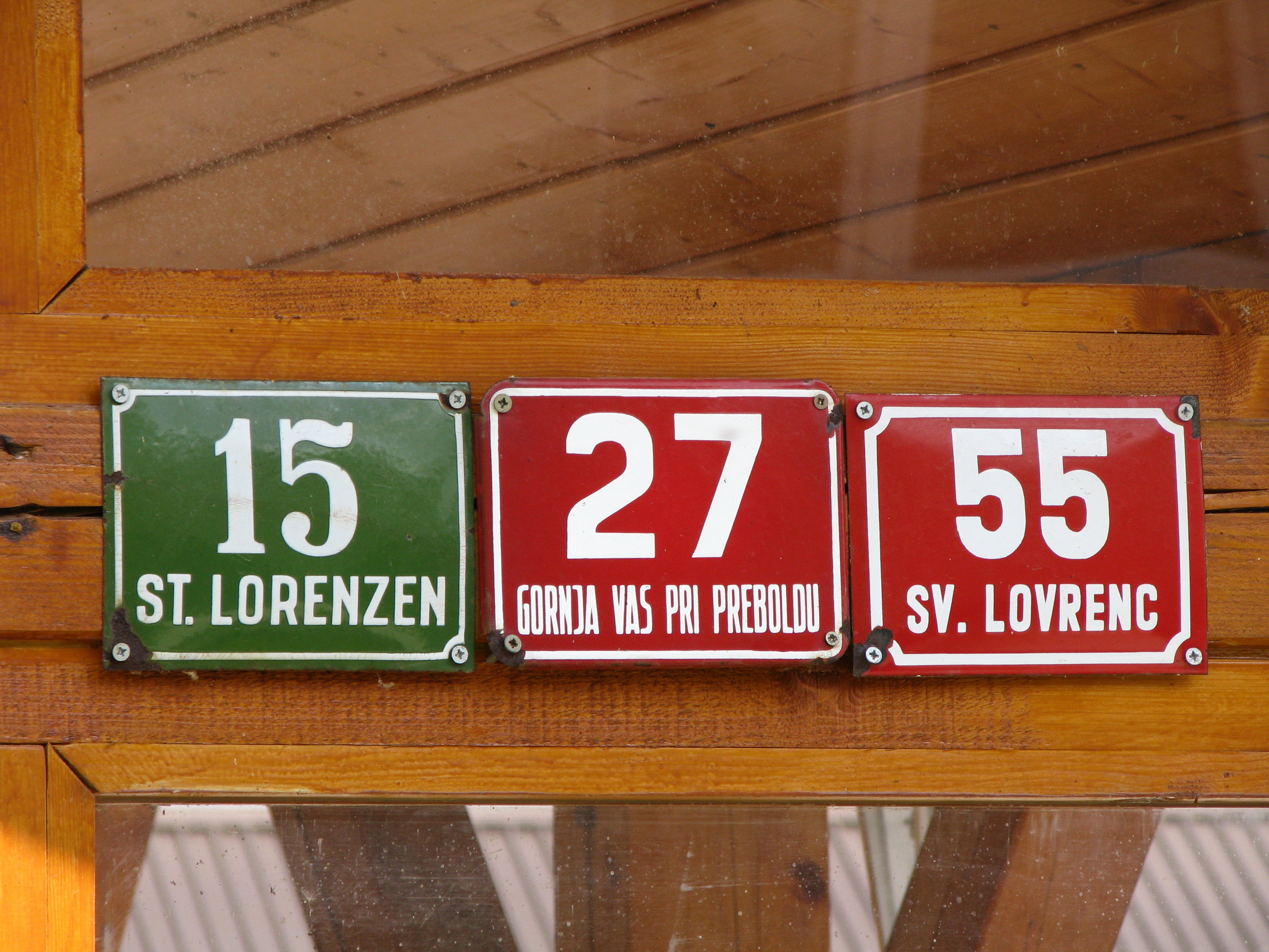 Nekdanji in sedanja hišne številke v vasi Sveti Lovrenc.